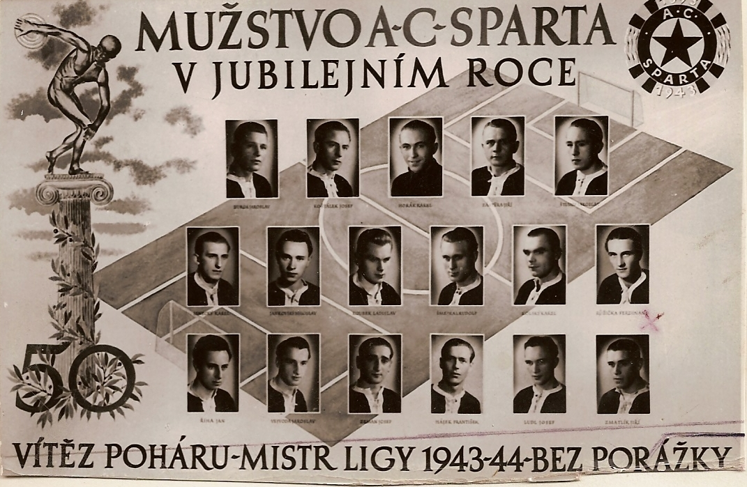 Ferdinand Růžička prostřední řada vpravo.